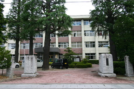 長野県松本県ヶ丘高等学校校舎